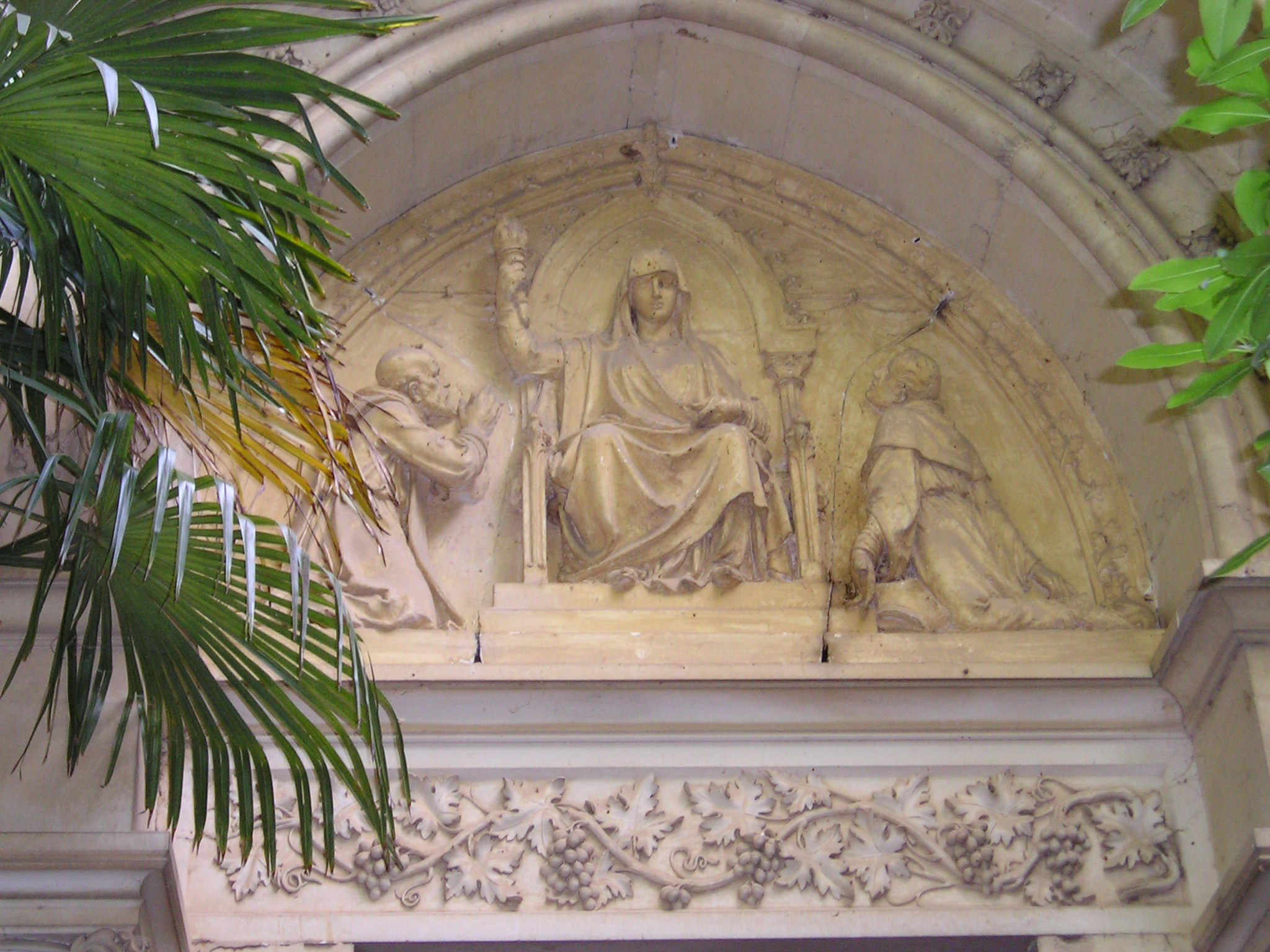 A Montpellier, dans le domaine de Grammont, le tympan de la chapelle.